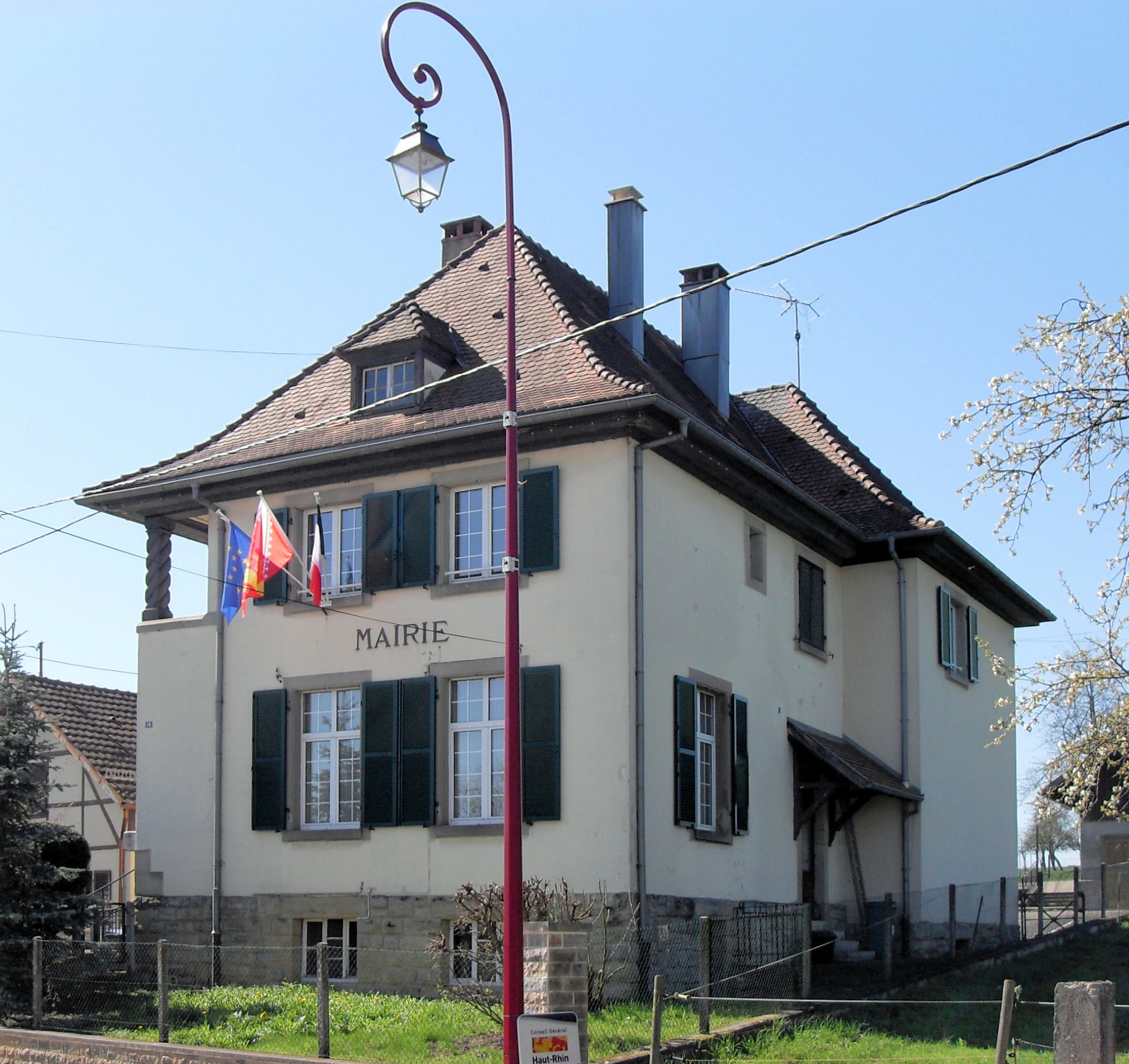 La mairie de Falkwiller